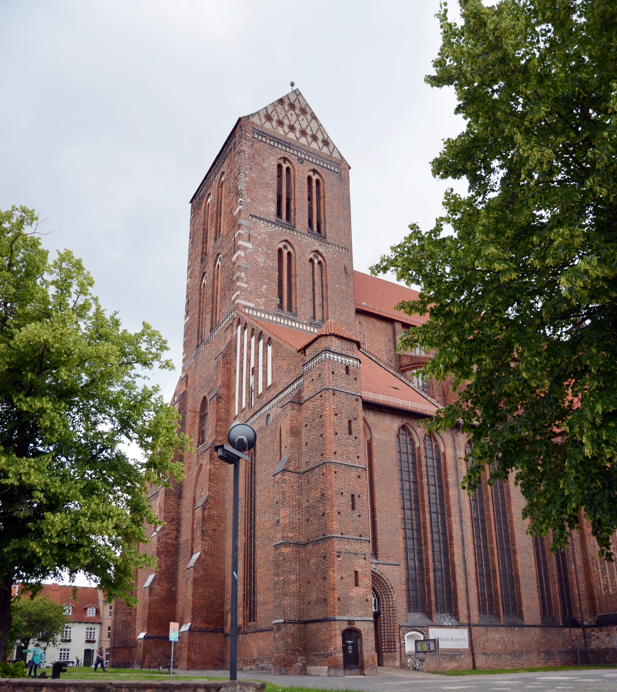 Nikolaikirche (Wismar)